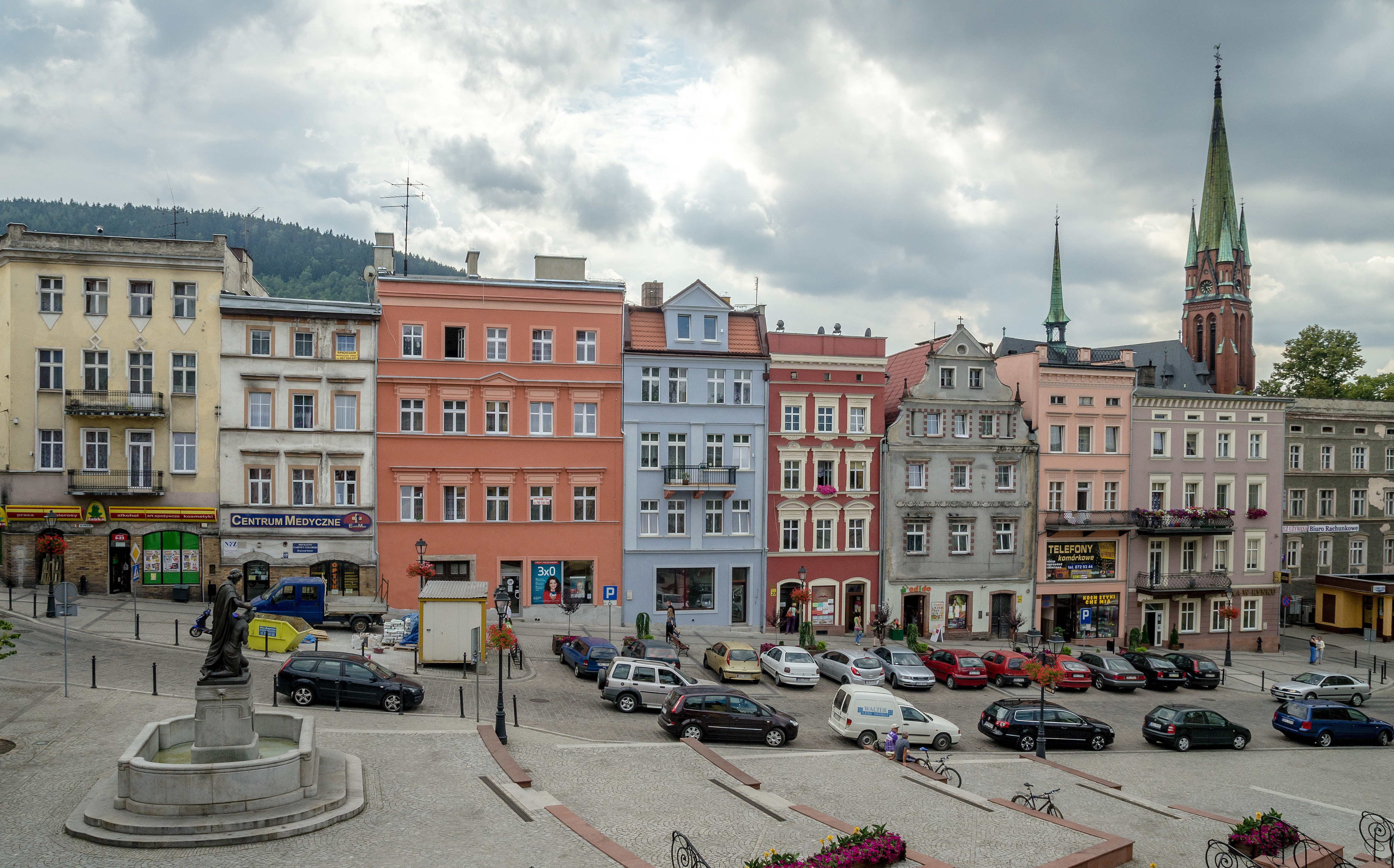 Nowa Ruda - widok z ratusza This photo of Lower Silesian Voivodeship was taken during Wikiexpedition 2013 set up by Wikimedia Polska Association. You can see all photographs in category Wikiekspedycja 2013.